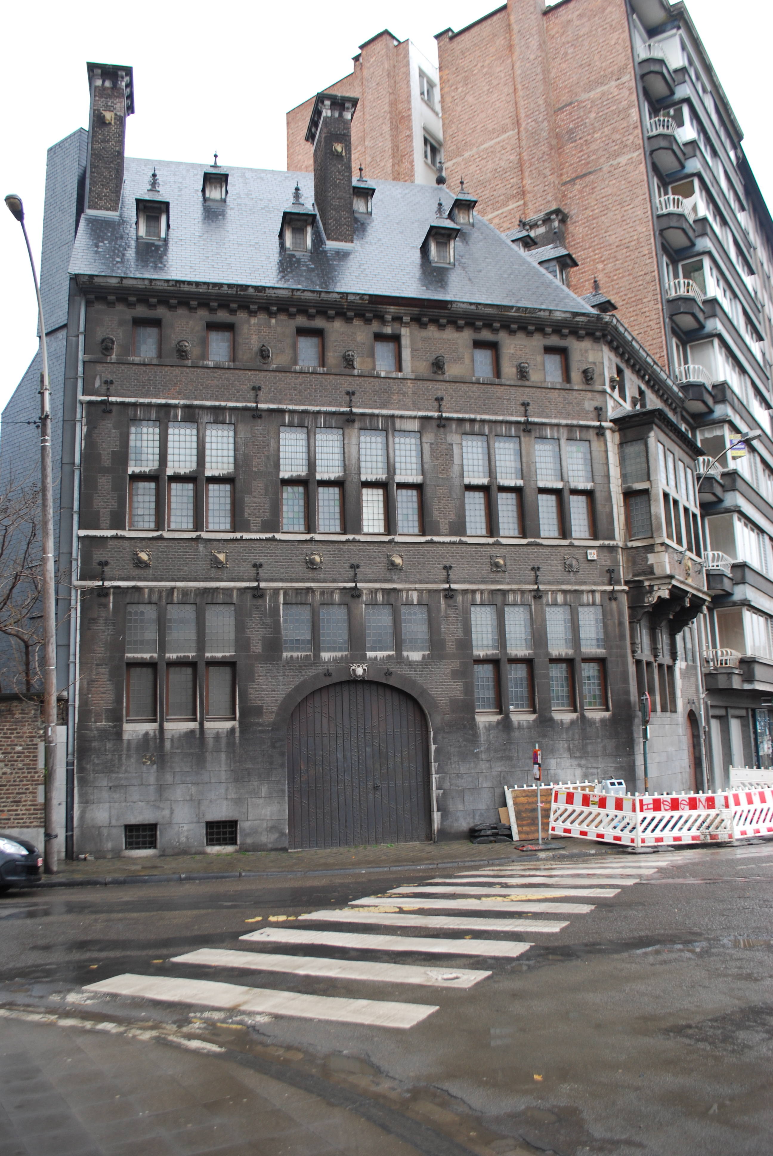 Vue de la rue de Fragnée à Liège.